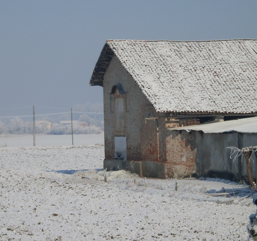 Luogo dell'apparizione mariana a Racconigi nel 1493